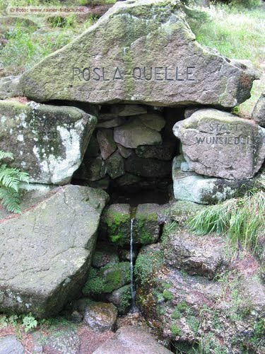 Schneeberg